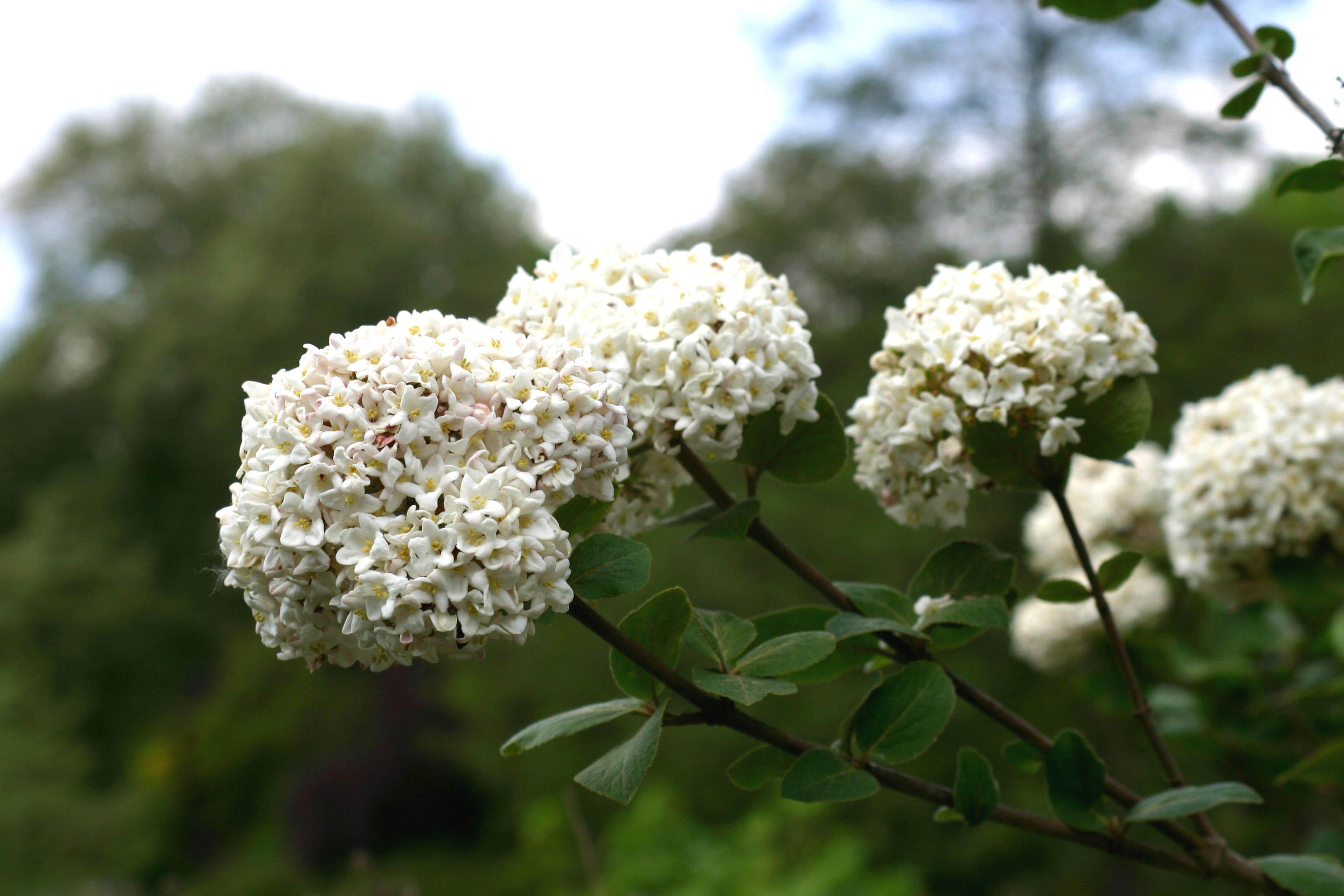 Koreanischer Schneeball (Blüte) im Botanischen Garten der Westfälischen Wilhelms-Universität Münster (Viburnum carlesii)